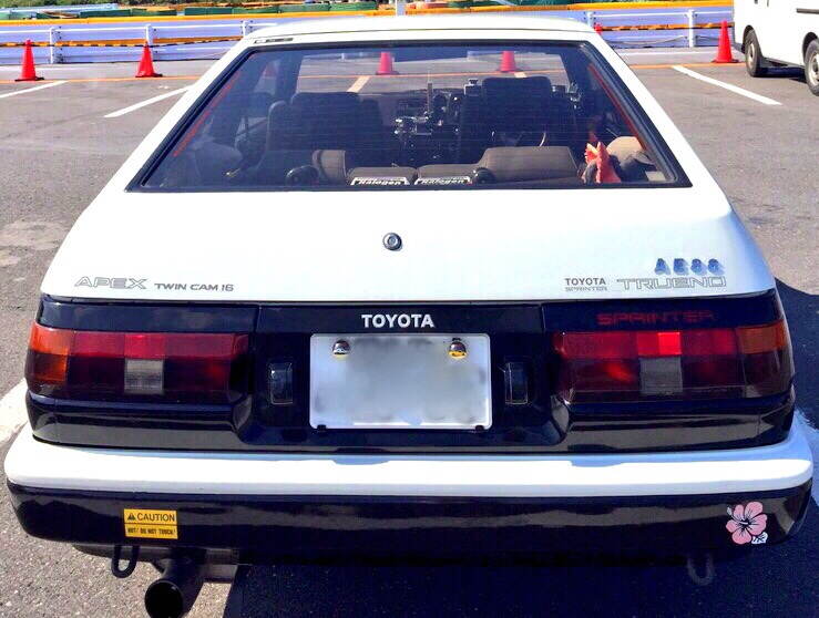 My AE86's image